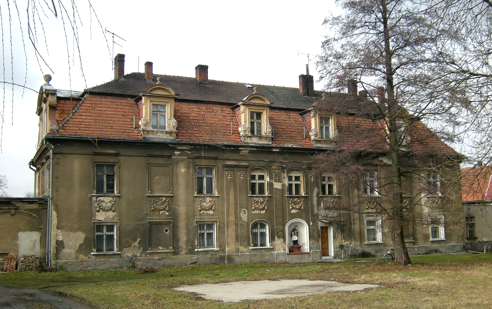 Nowy Świętów - dwór, XIX w (zabytek nr 1962/72 z 28.10.1972)